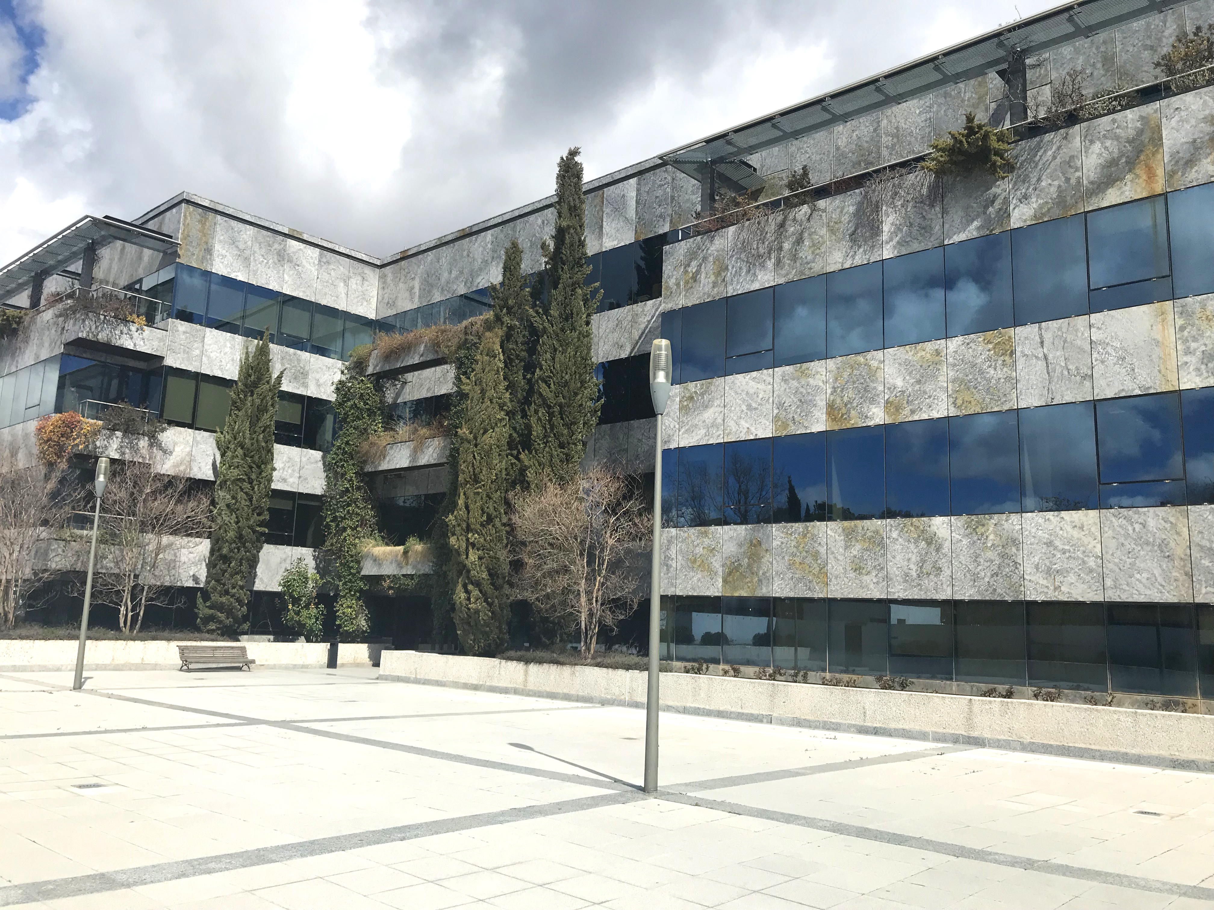 foto de la sede de Diners Club Spain Pozuelo de Alarcon, Madrid